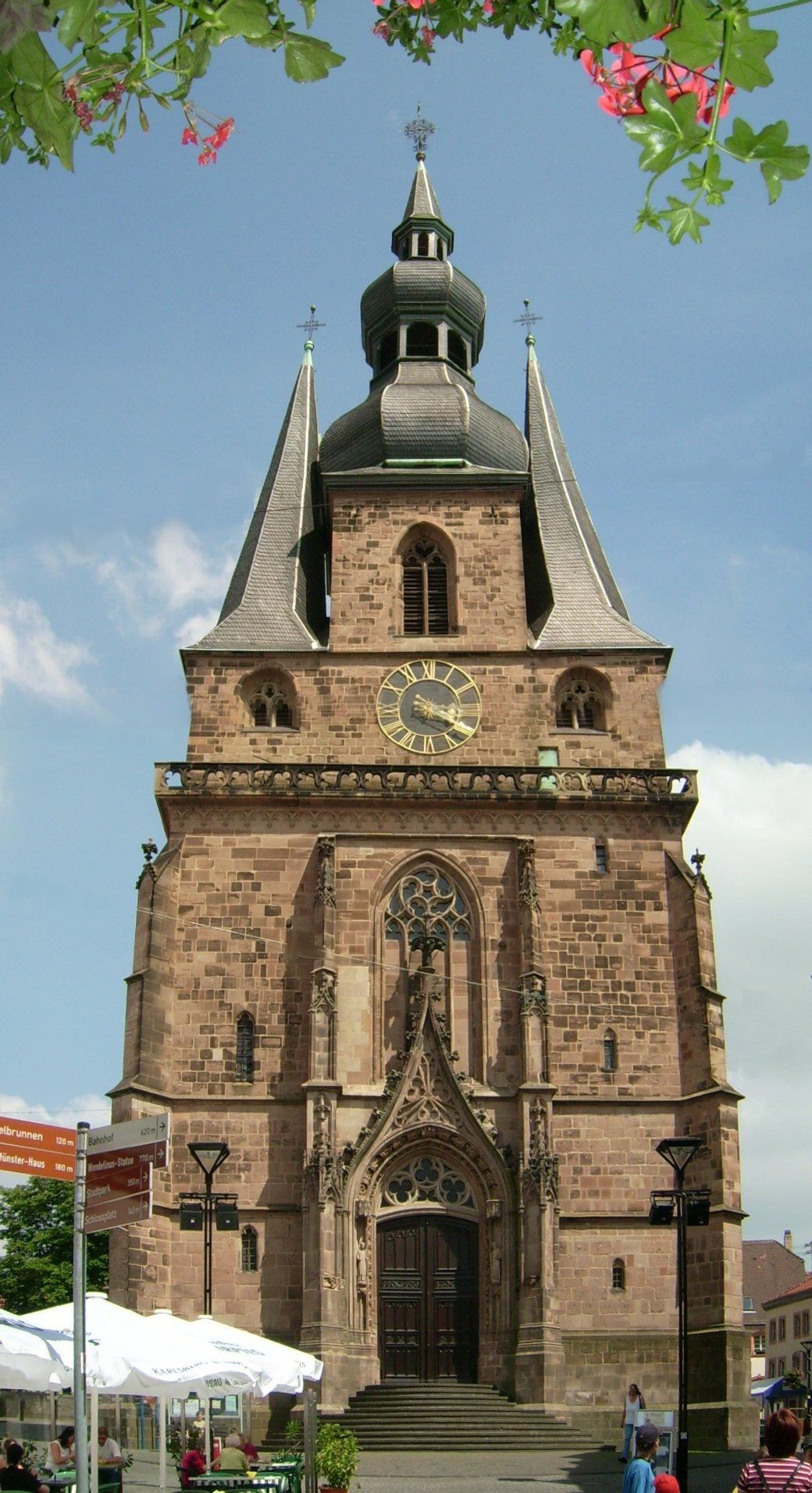 Dom Basilika in St. Wendel Front Wendelinus Wendalinus